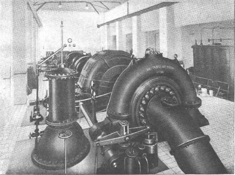 Maschinensaal KW Lungernsee der Zentralschweizerischen Kraftwerke, Luzern, Schweiz 1927: zwei Bell Spiral-Francisturbinen mit 6000 PS 187 Meter Gefälle und 15000 PS 167 Meter Gefälle